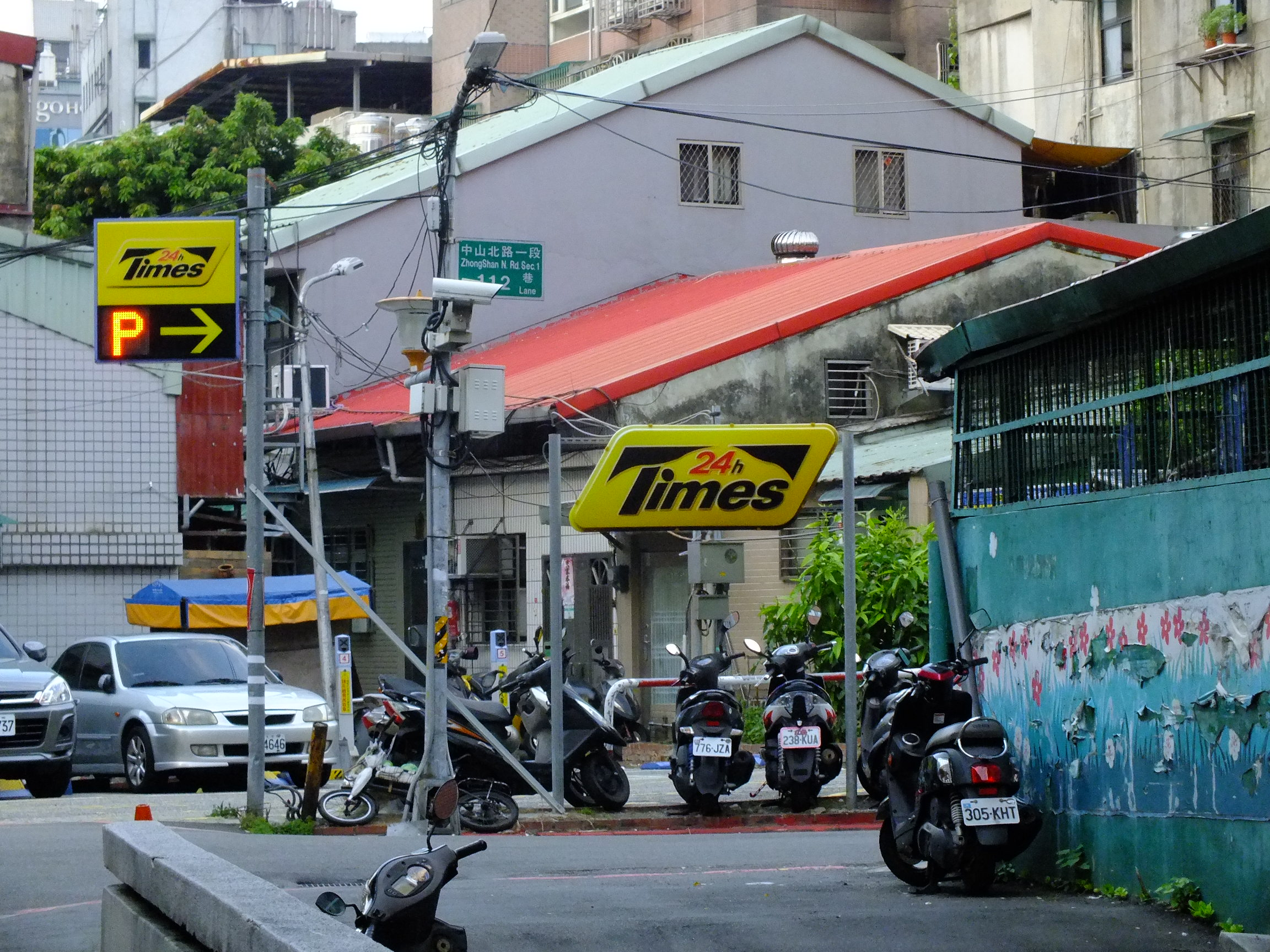 Times Park24、台北市中山区中山北路一段112巷。